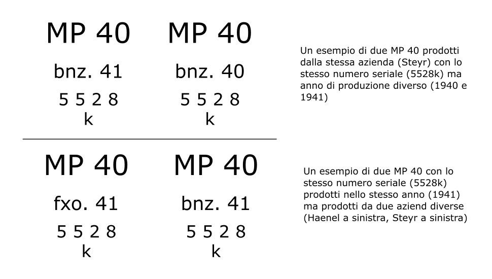 Una schematica rappresentazione di alcuni loghi MP 40 per meglio spiegare la questione dei seriali identici su armi diverse